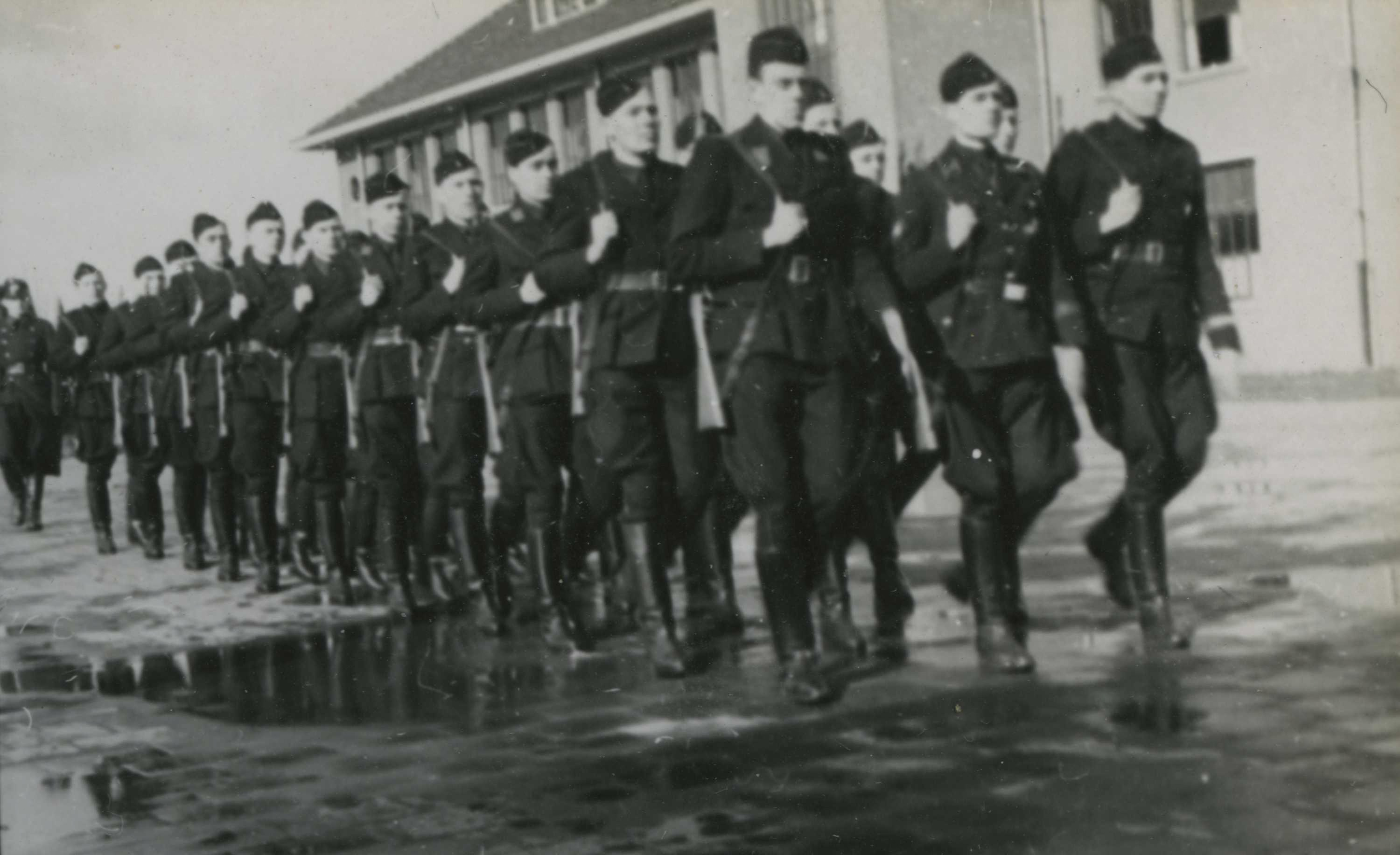 Opleiding van de Landwacht 'Nederland' te Schalkhaar op 2-3-1944. Deze foto is afkomstig uit het archief van de Fotodienst der NSB.